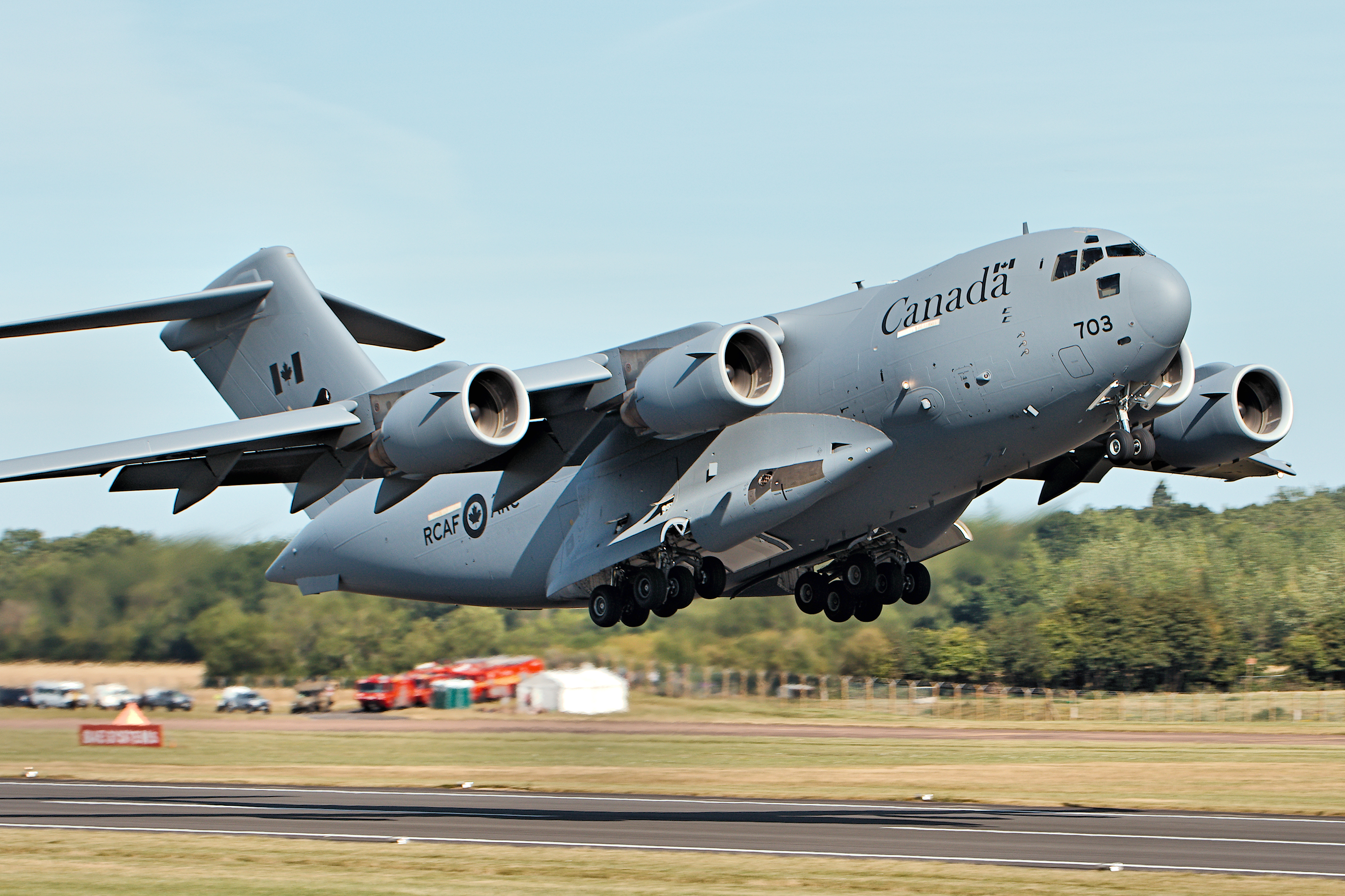 CC-177 Glbemaster - RIAT 2017